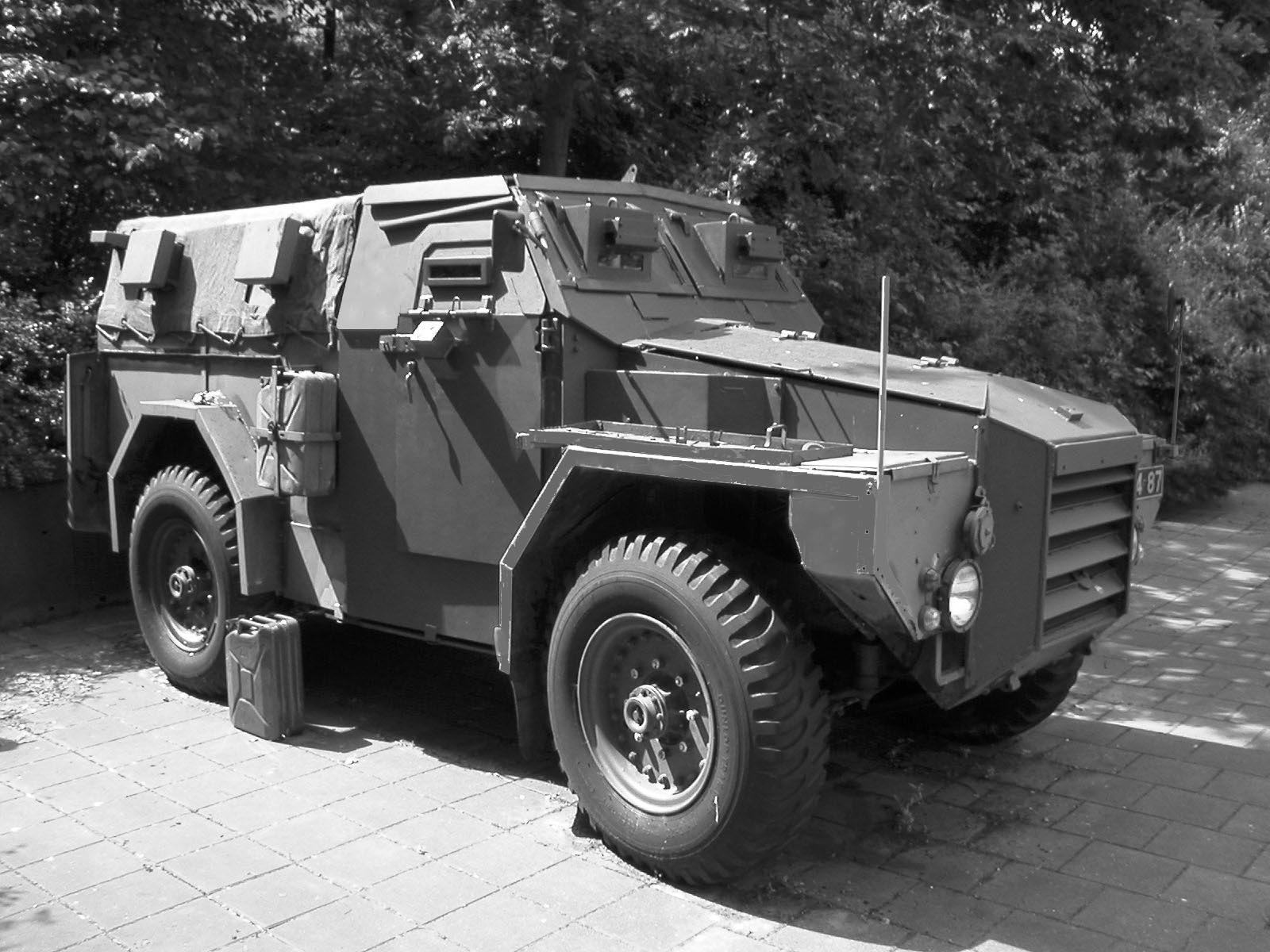 Einer mit voller Zusatzpanzerung ausgestatteter Humber FV1612 wie er in Nordirland im Einsatz war.